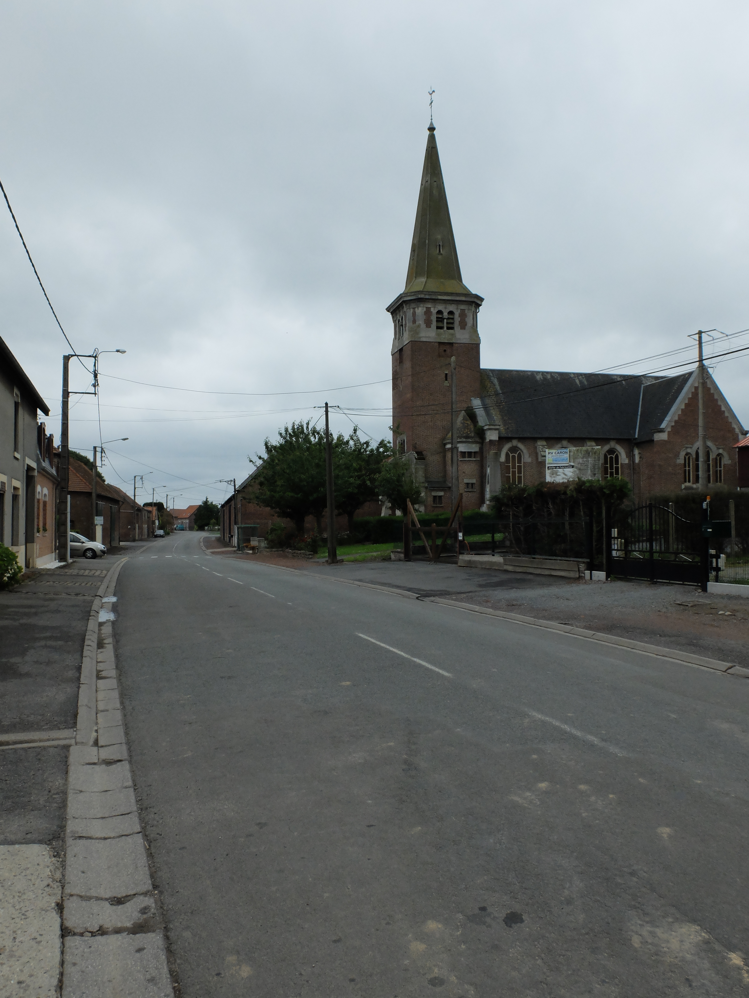 Vue de la rue de Clichy de Riencourt-lès-Cagnicourt. On peut y voir l'église de la commune.